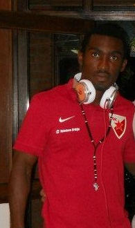 Ли Ади